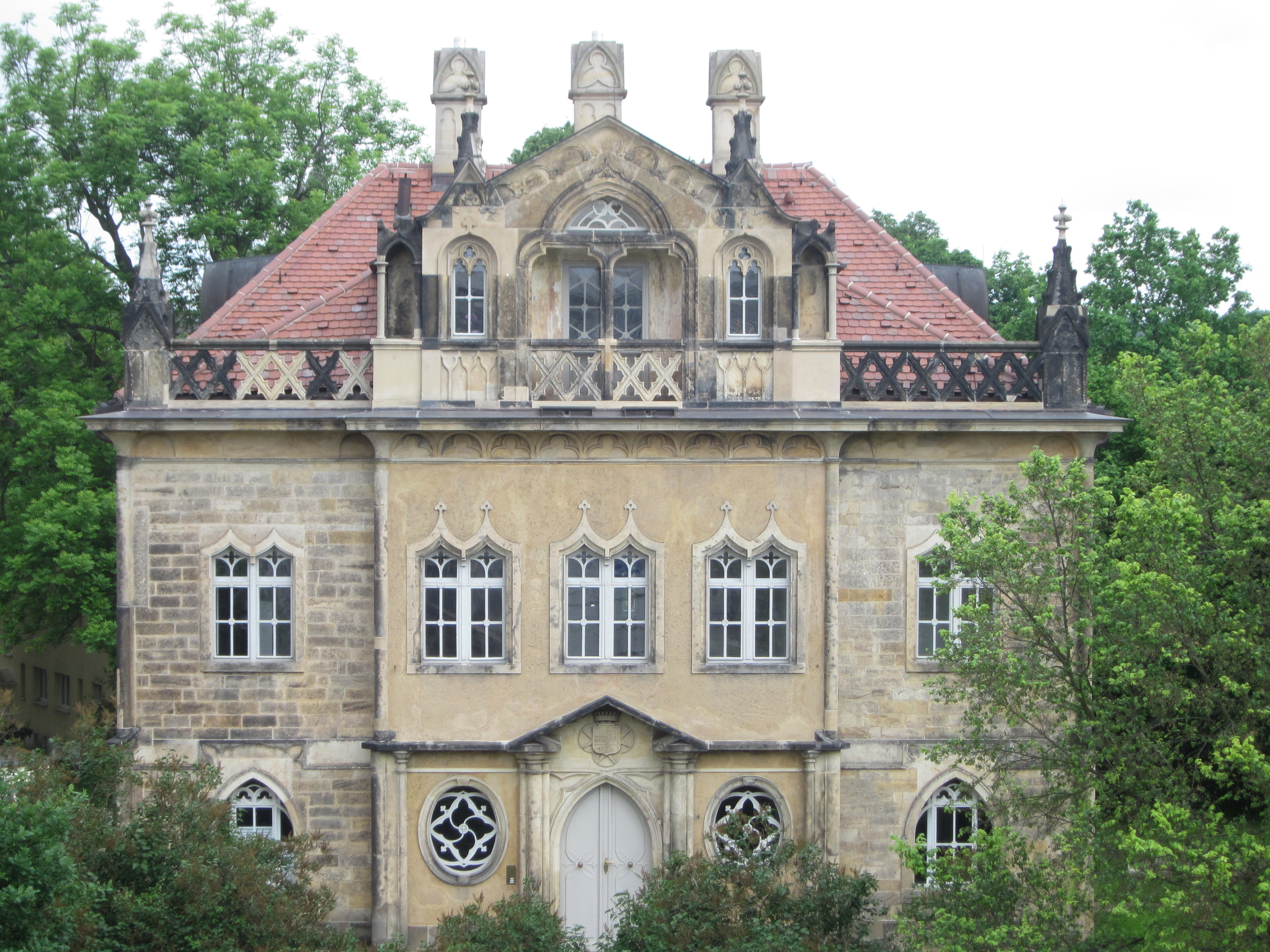 Jagdschloss Waldschlösschen Dresden